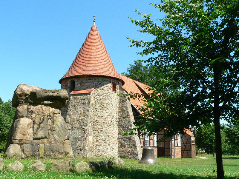 Suderburg St. Remigius Sonstiges: freie Lizenz